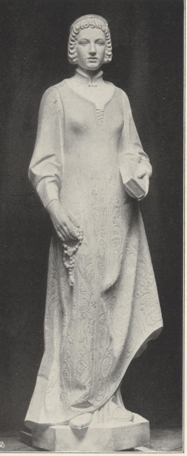 Margarete von Sizilien Aragon, geschaffen von Hubert Netzer, 1910